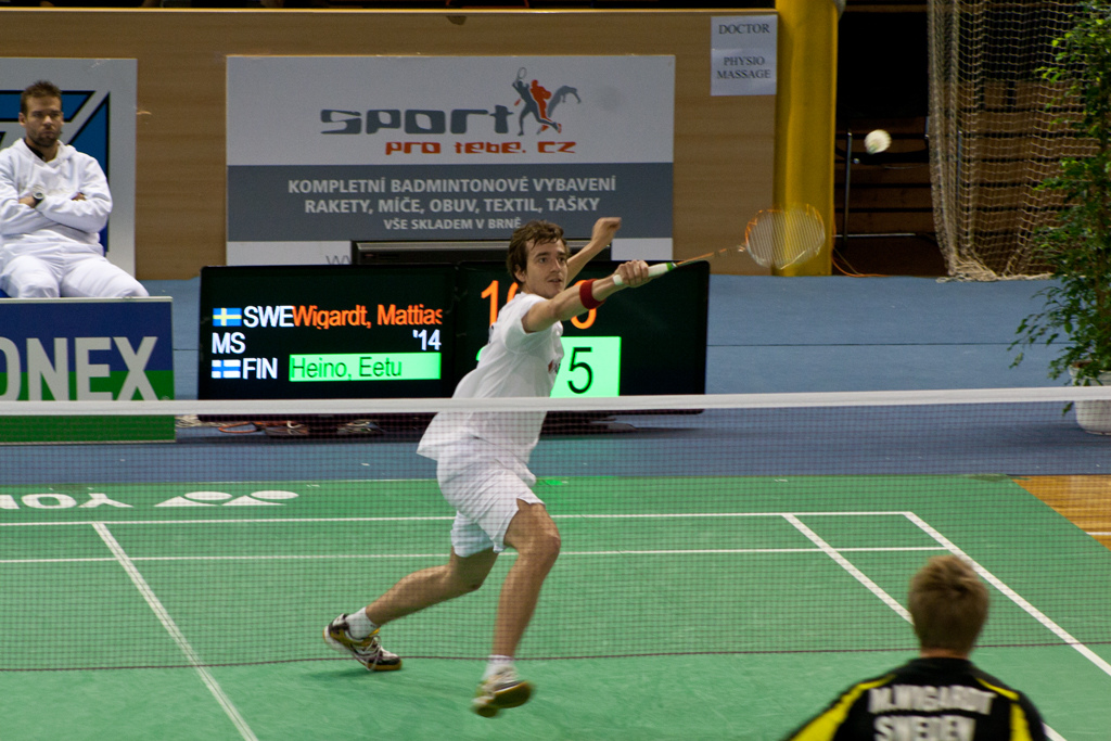 Mezinárodní mistrovství ČR v badmintonu